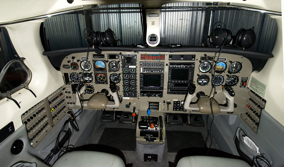 Piper PA-46-350P Malibu Mirage RA-0217G. Cockpit.